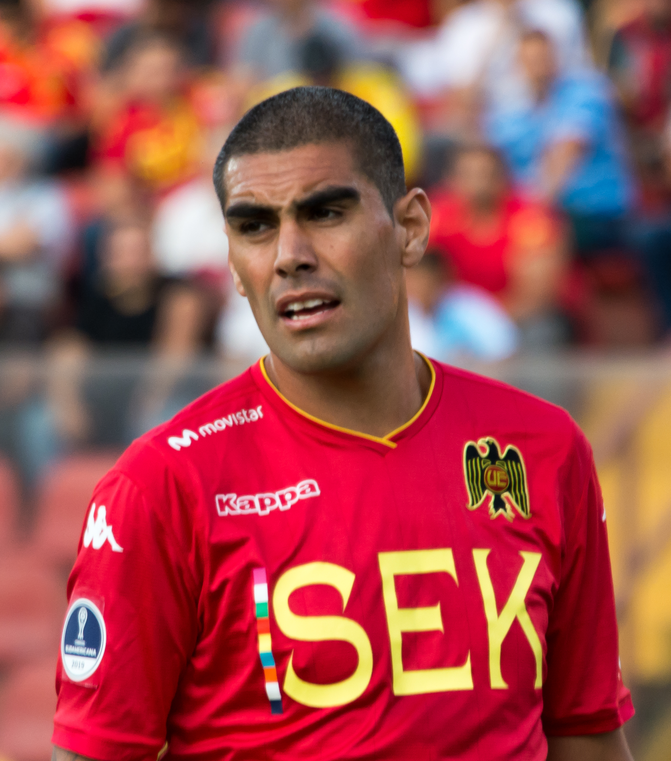 Sebastián Varas, Unión Española v Mushuc Runa, Estadio Santa Laura, Independencia, Santiago, Región Metropolitana, Chile.